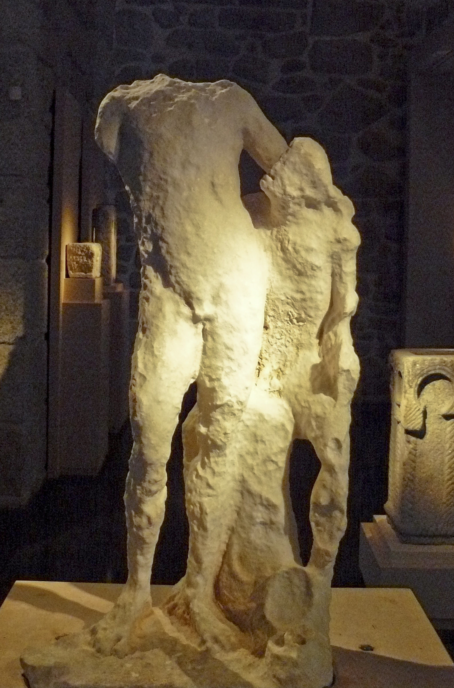 Estatua de Dionisos e Sátiro.